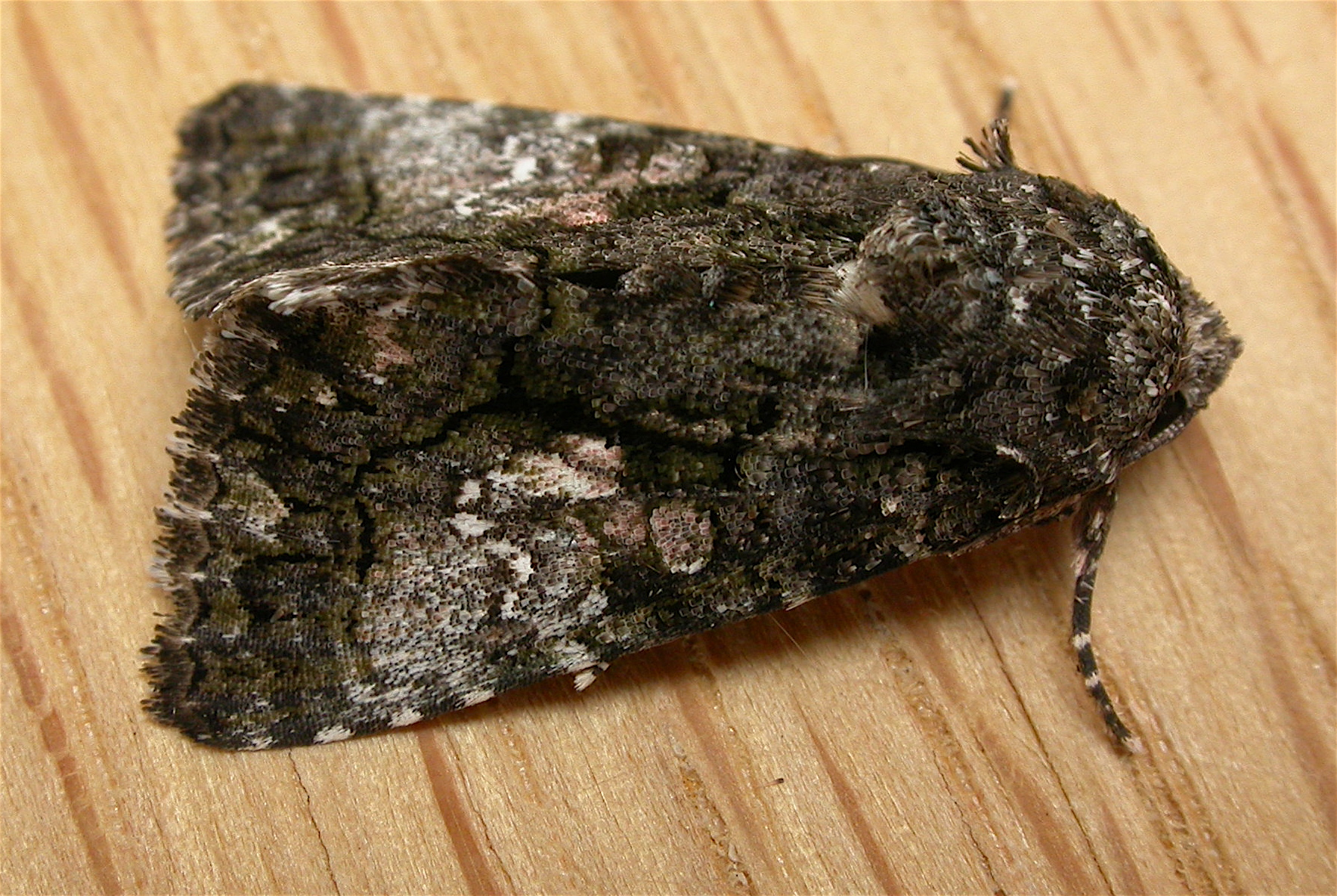 Aedia leucomelas (Linnaeus, 1758). Image taken at Aranda, Canberra (Australia).